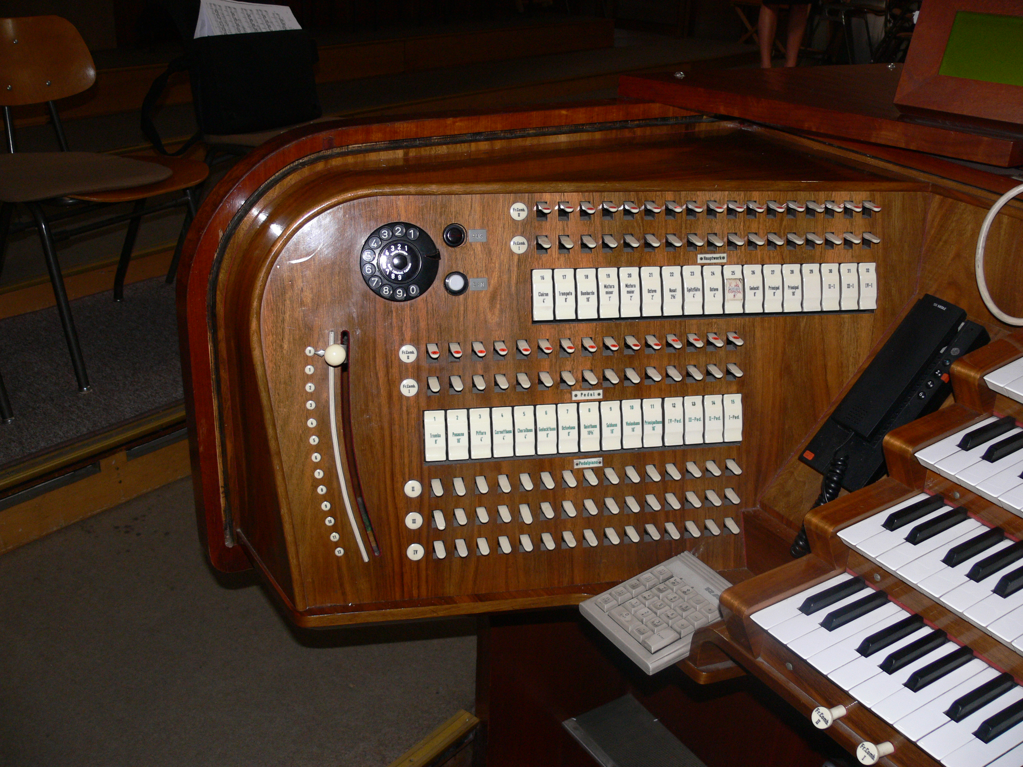 Liebfrauenkirche, Ravensburg Reiser-Orgel, Biberach, op. 292, Spieltisch, linke Seite